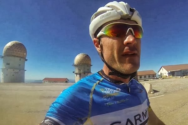 Gamito na A Serra da Estrela